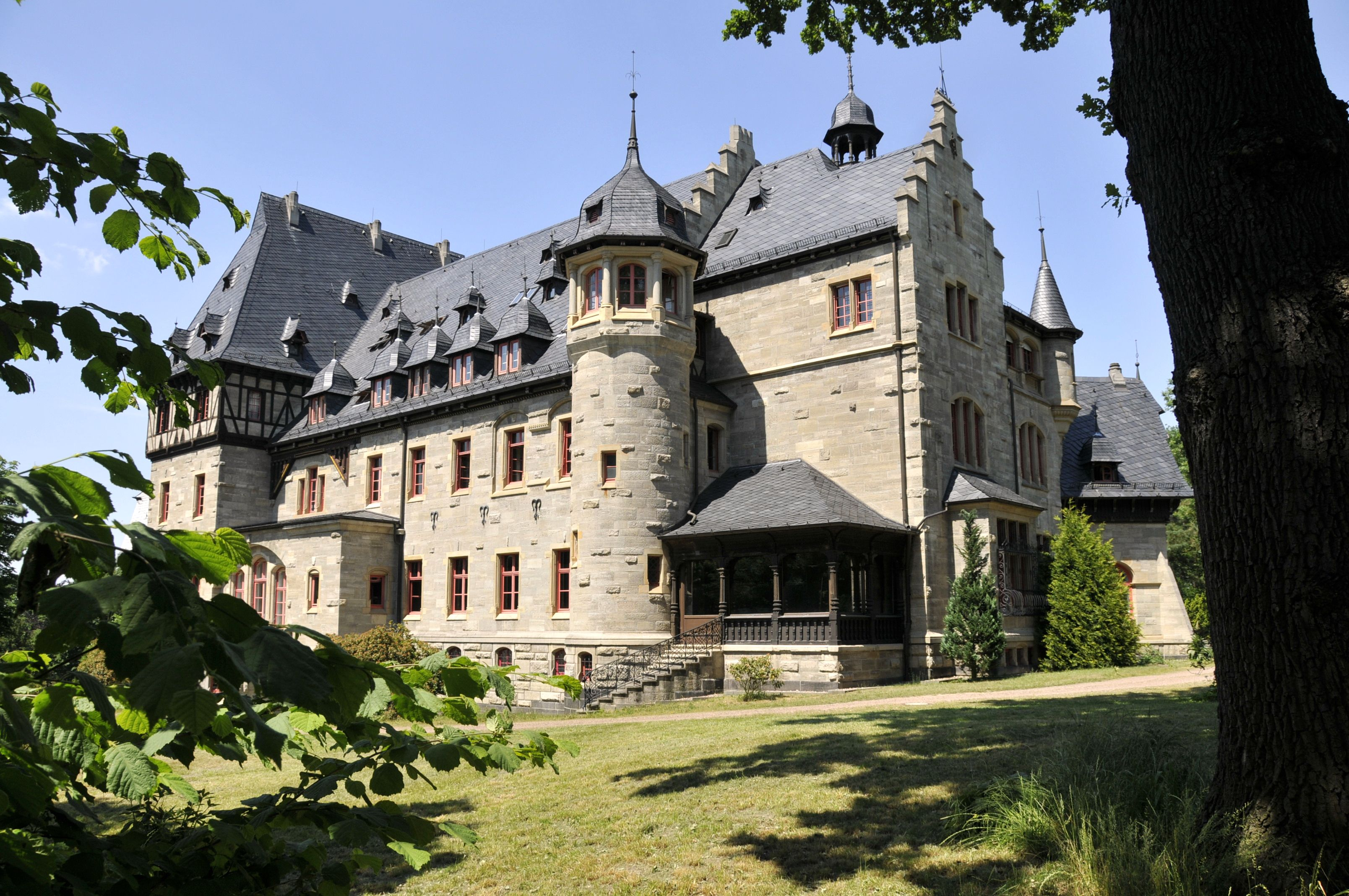 Eisenach, Villa Eichel-Streiber in der Dr.-Moritz-Mitzenheim-Str.